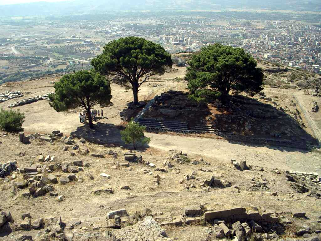 Pergamnonaltar, leere Basis in der antiken Stadt Pergamon, Türkei